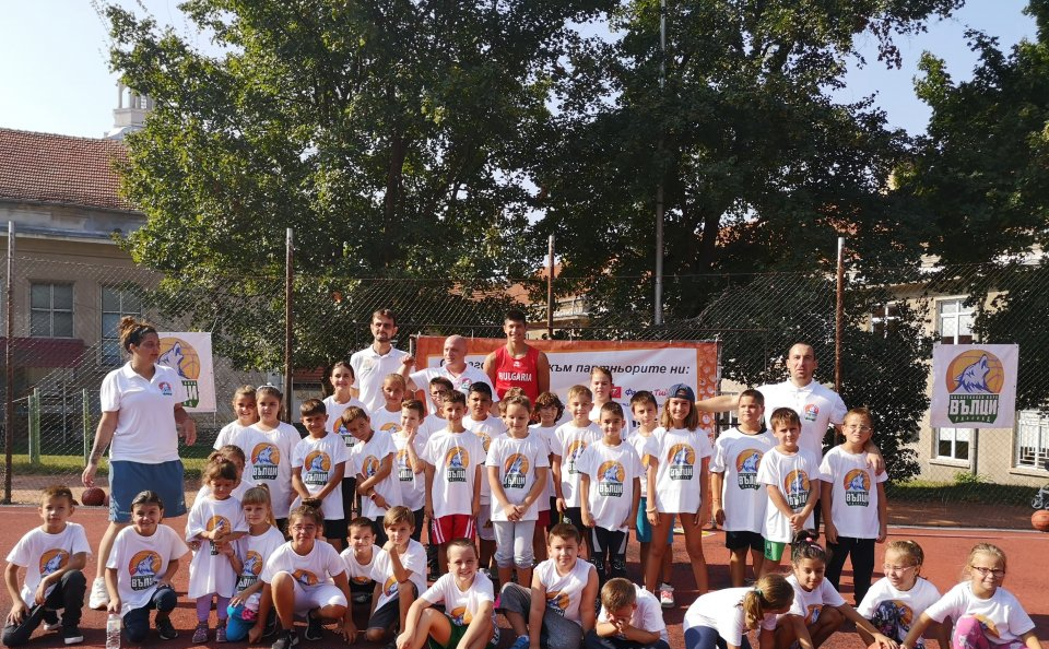 Баскетболен отбор "Вълци", Разград